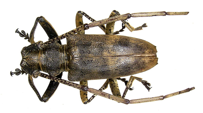 Familie: Cerambycidae Grösse: 28 mm Fundort: Indonesien, Batanta Isl., Yensawal leg. A.Skale, 2004; det. A.Weigel Foto: U.Schmidt, 2007